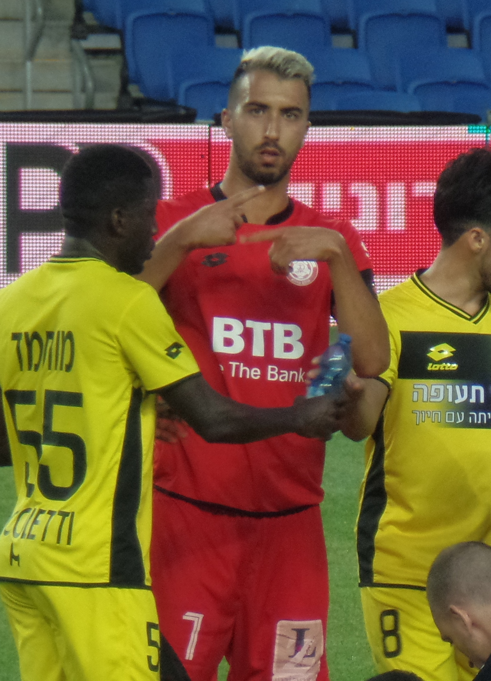 אליאל פרץ במדי הפועל חדרה 2019